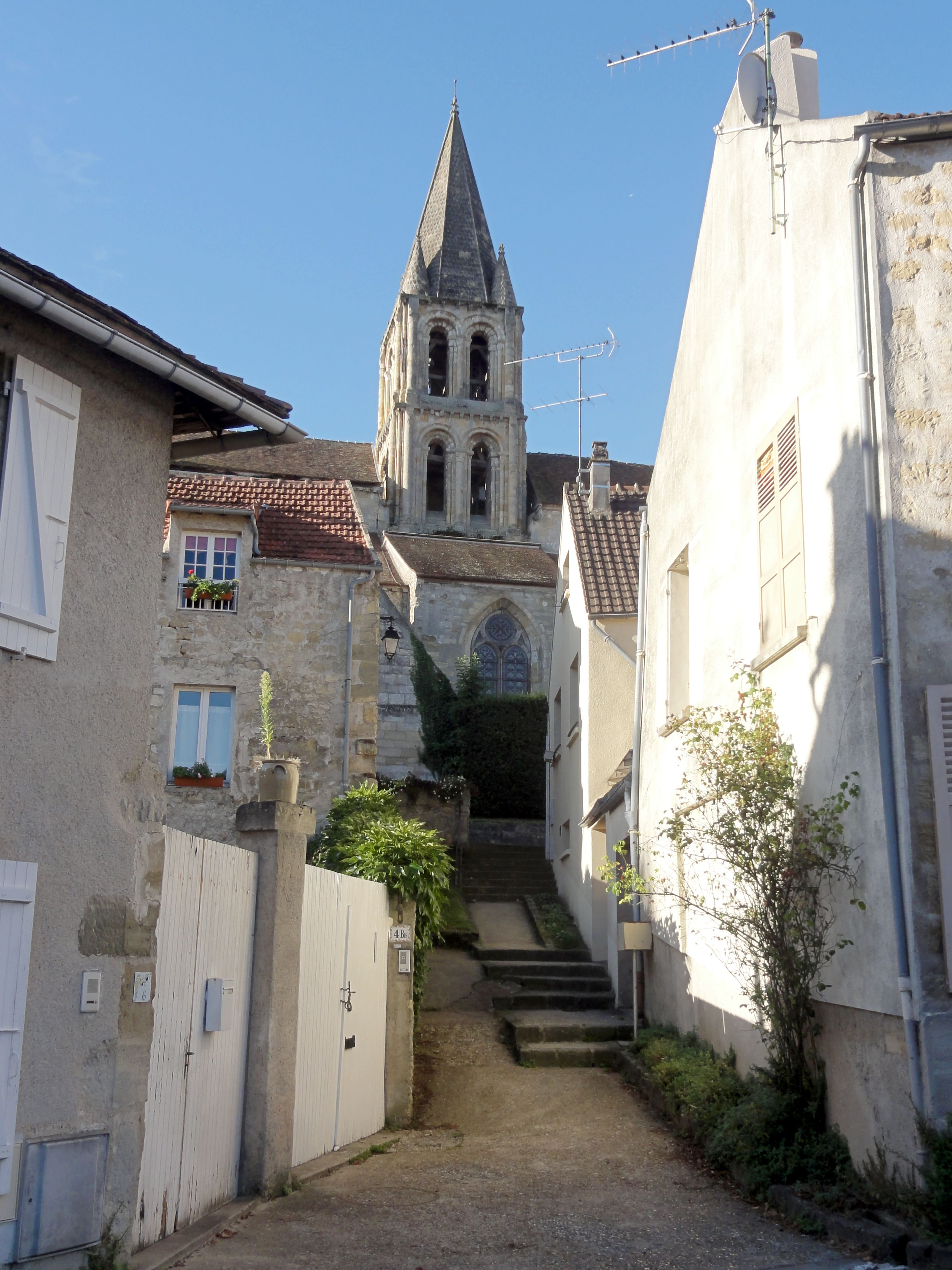 Vue partielle depuis le nord.